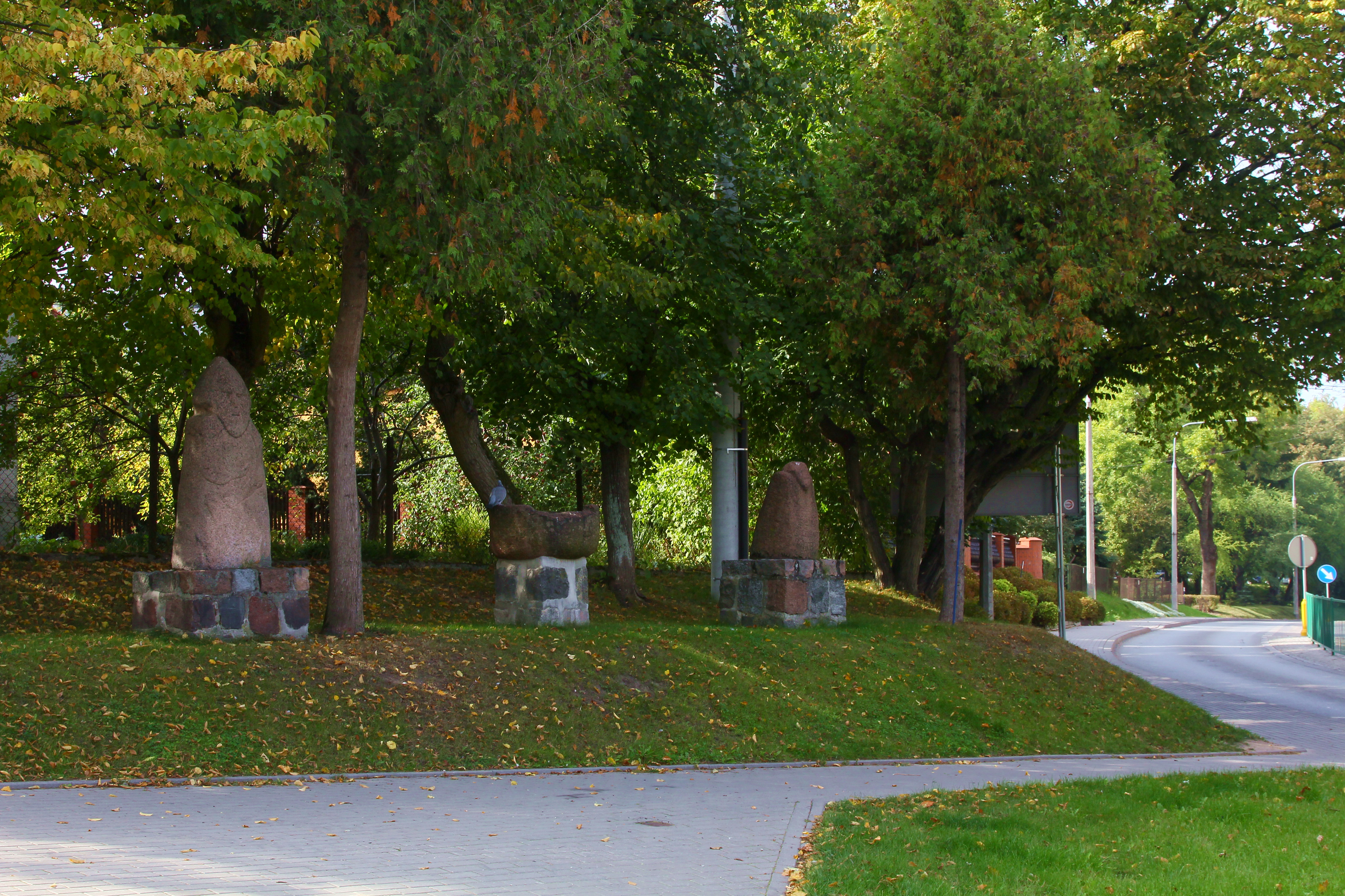 Pruskie kamienne baby z Bartoszyc.